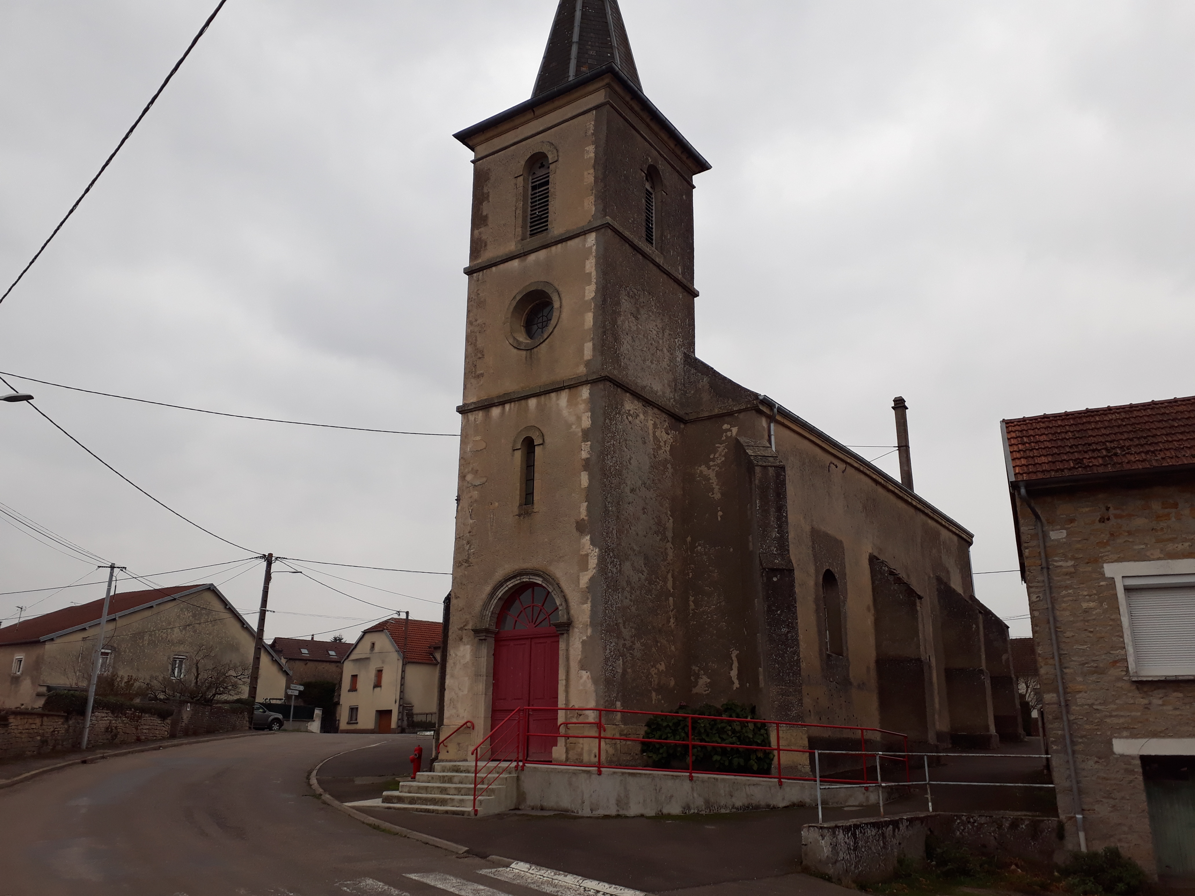 Amoncourt Eglise